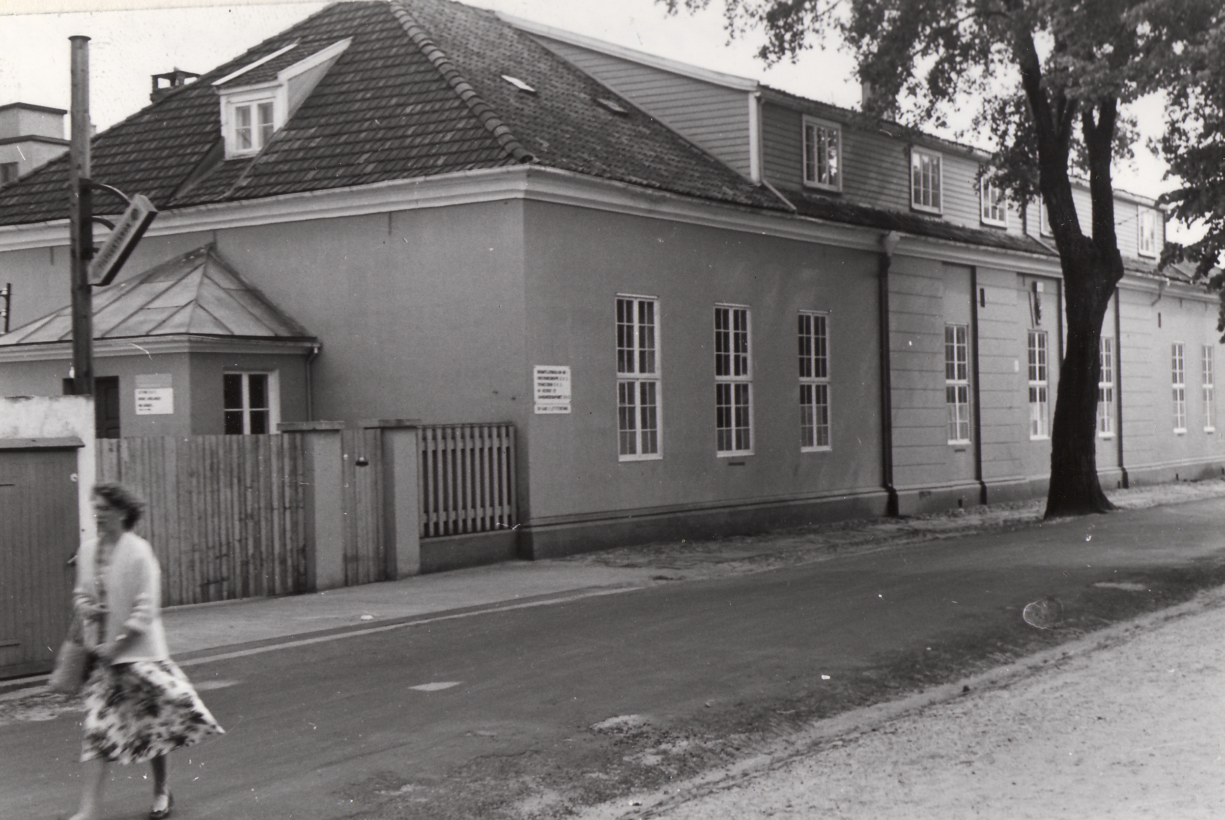 Ekserserhuset, Tordenskioldsgt. 64 i Kristiansand, Vest-Agder